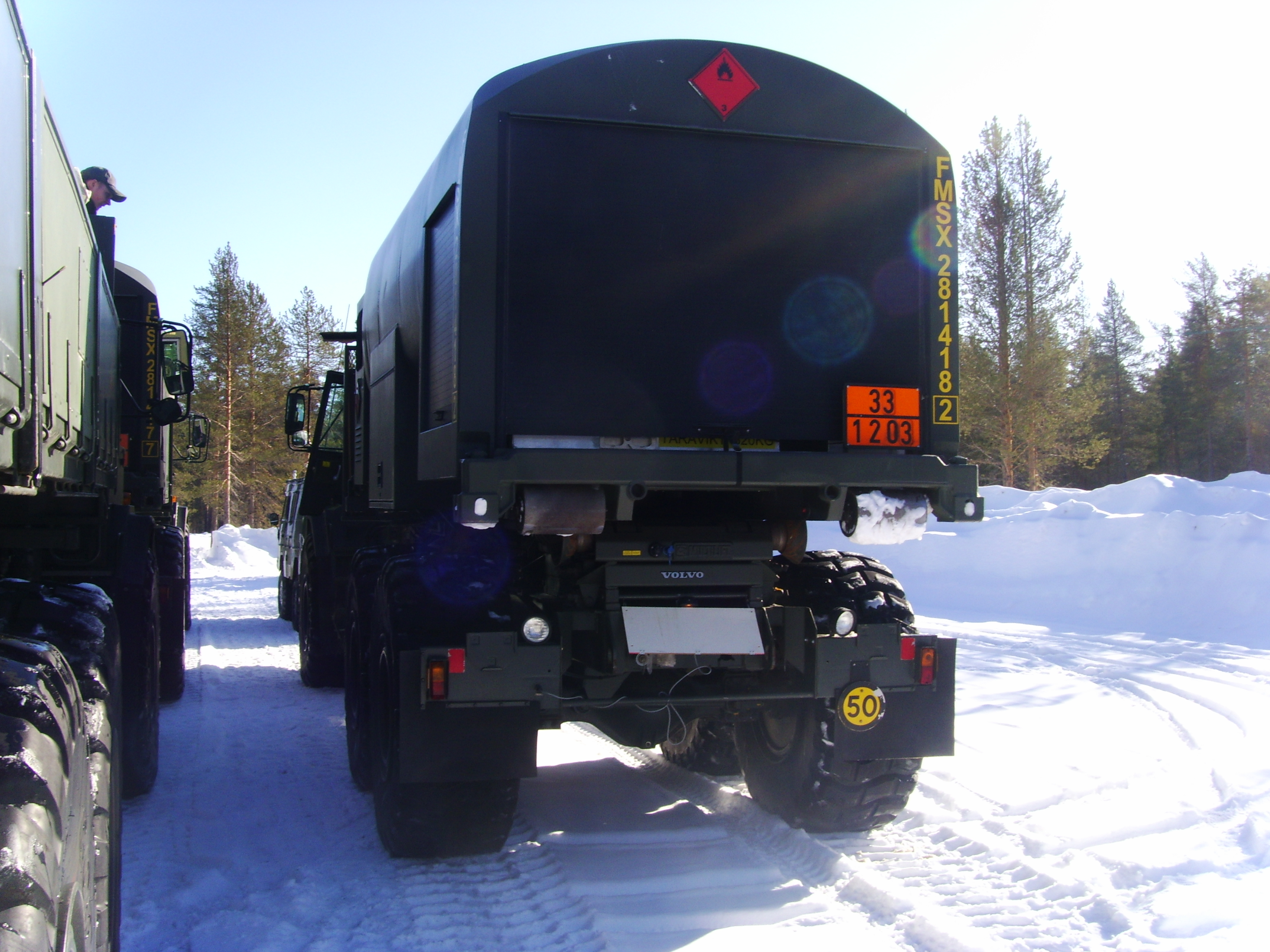 En drivmedelsdumper från en TOLO-pluton i Försvarsmakten. Till höger syns även en dumper med ett ammunitionsflak.